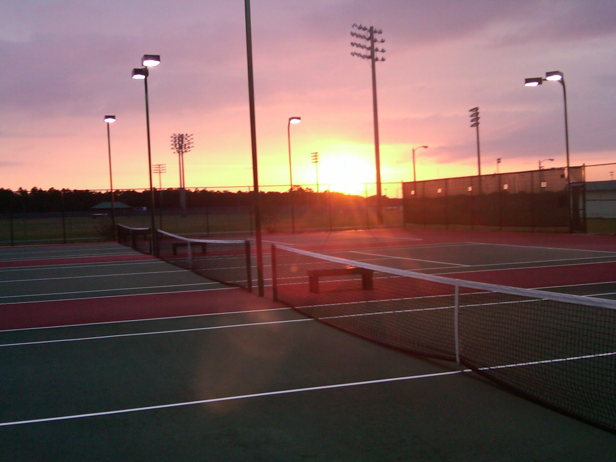 Sunrise